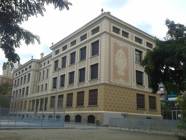 Escola Lluís Vives edificada l'any 1931